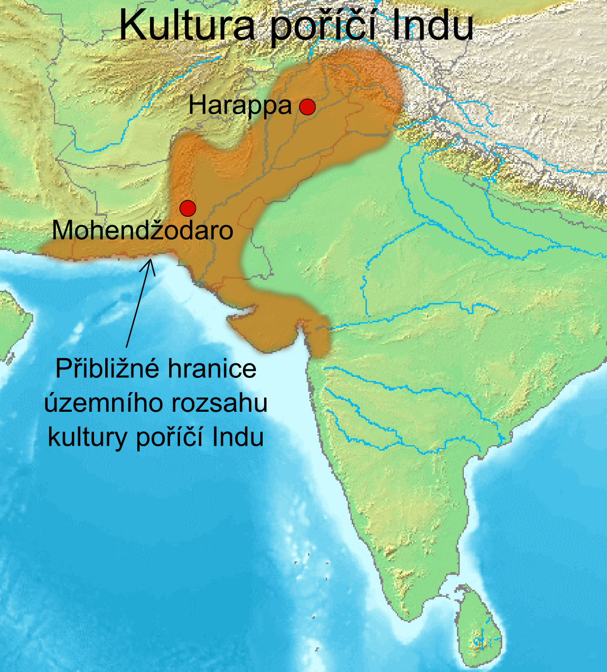 Mapa Indického subkontinentu se schematickým vyznačením rozsahu kultury poříčí Indu.